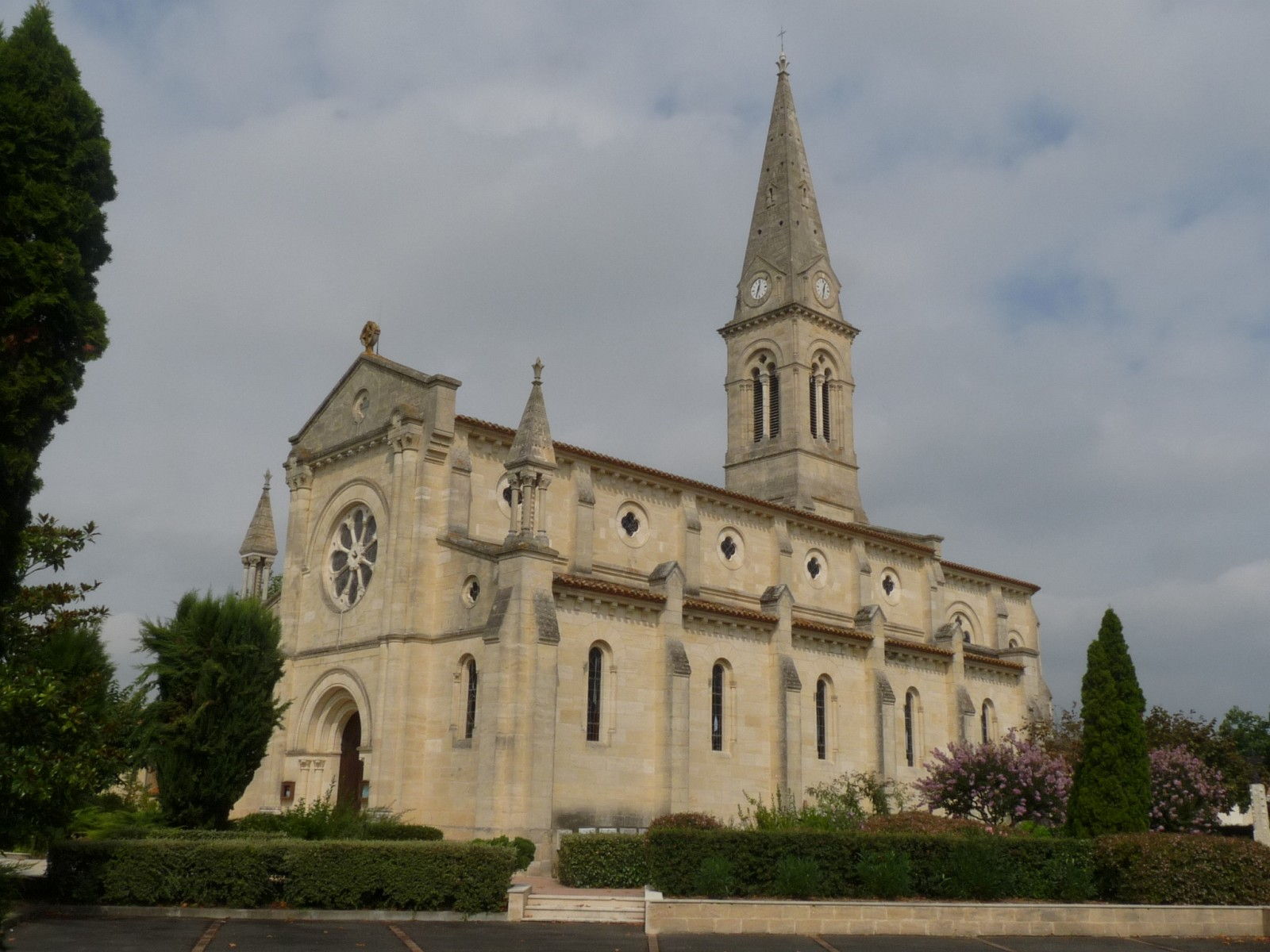 Eglise de Braud-et-Saint-Louis,Gironde, France